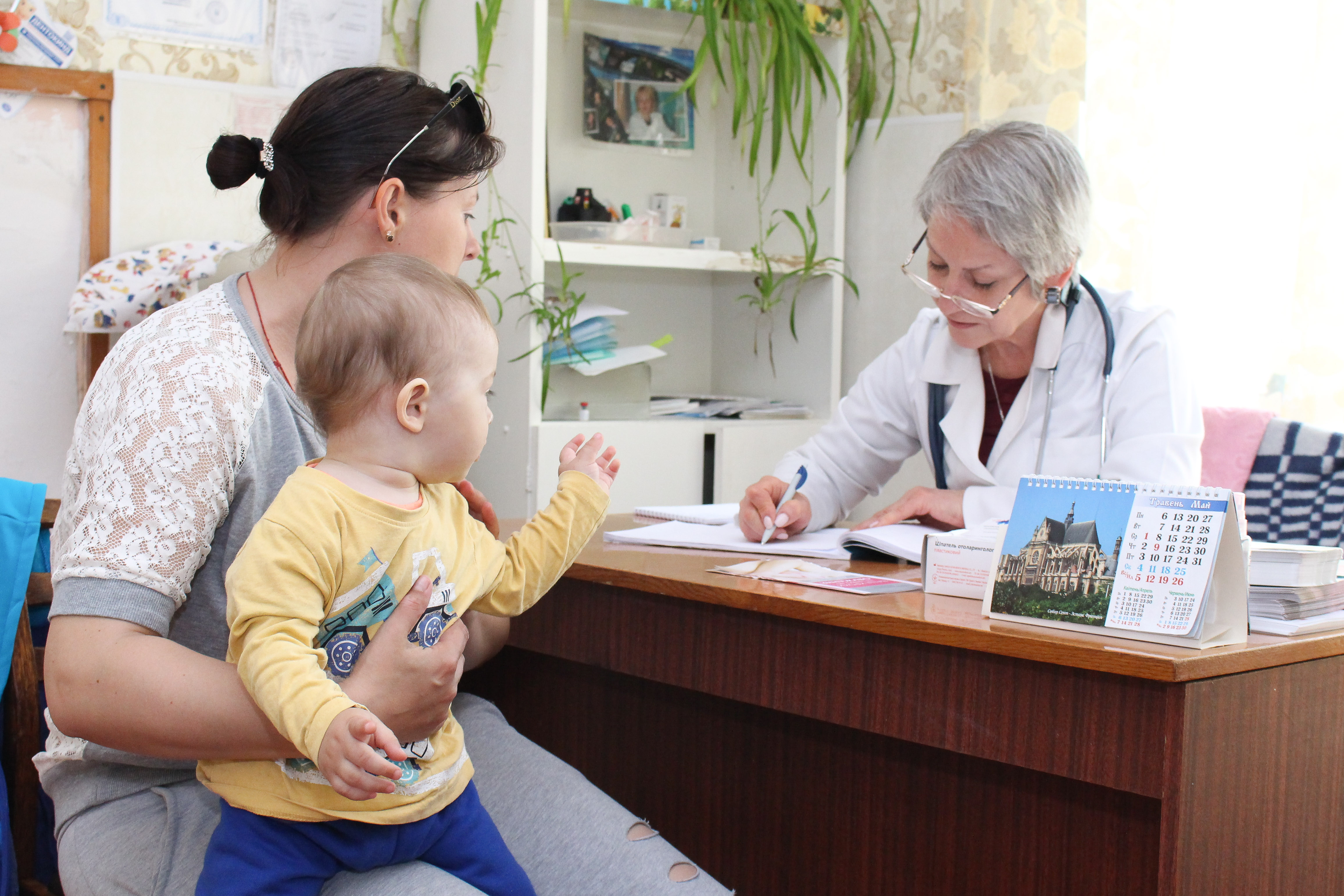 Лікар-педіатр Ткачук Тетяна веде обстеження у селі Магдалинівка